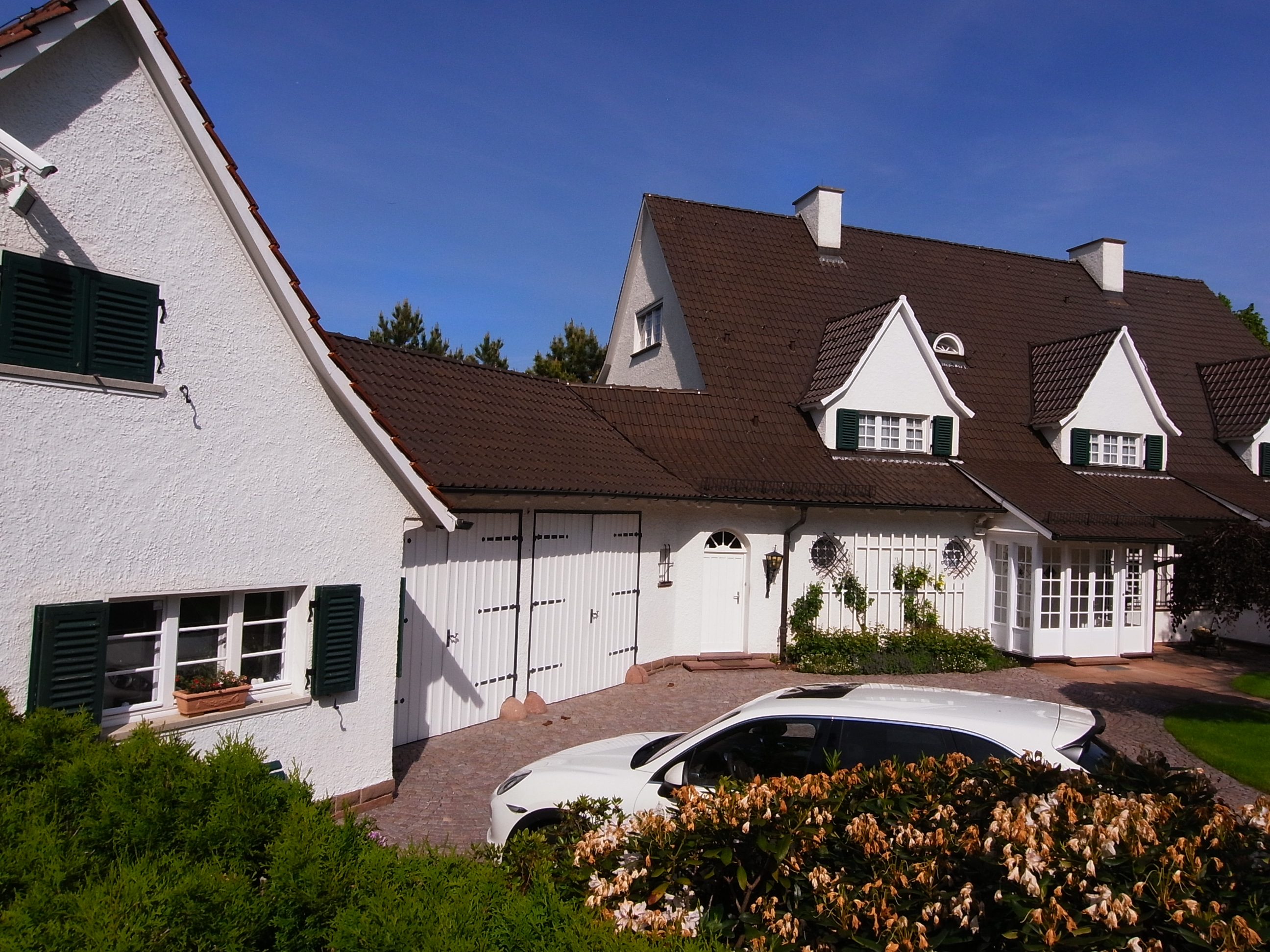 In der Bildmitte die Werkstatt der Villa Porsche, in der Ferdinand Porsche den ersten VW Käfer hergestellt hatte